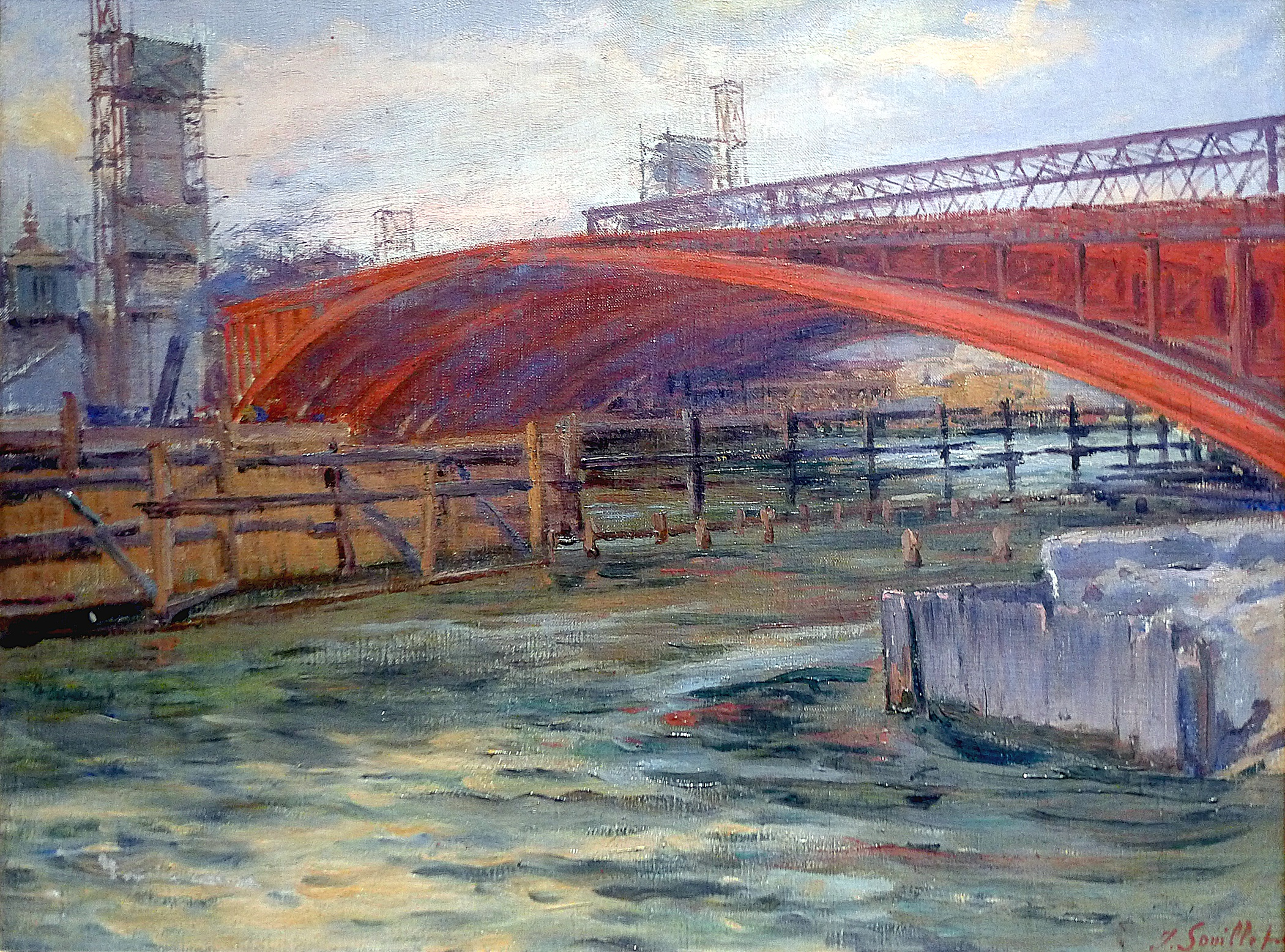 Tableau « La construction du pont Alexandre III »